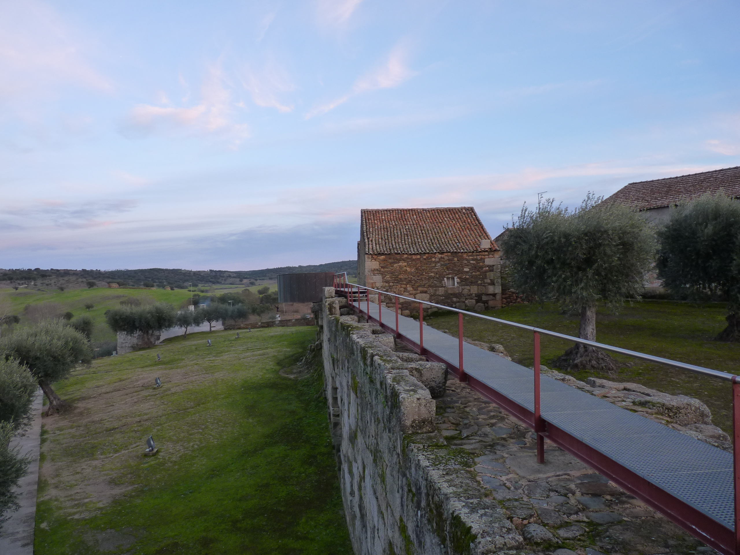 Conjunto arquitectónico e arqueológico de Idanha-a-Velha Inclui a denominada Catedral de Idanha-a-Velha This file was uploaded for Wiki Loves Monuments in Portugal with the unique identifier 70554.